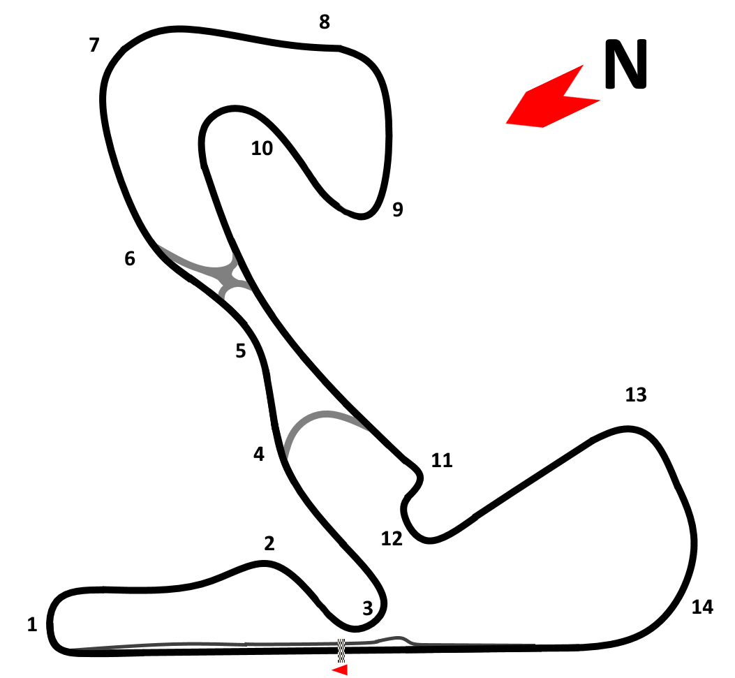 Este es un mapa del circuito Zandvoort que regresará a la F1 en 2020